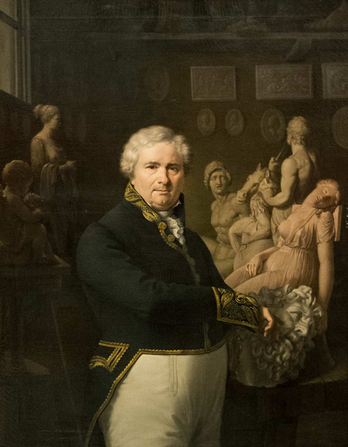 Retrat de Damià Campeny i Estrany (a. 1838), oli sobre tela, 136 x 105 cm, Reial Acadèmia catalana de Belles Arts de Sant Jordi, inventari general: 222